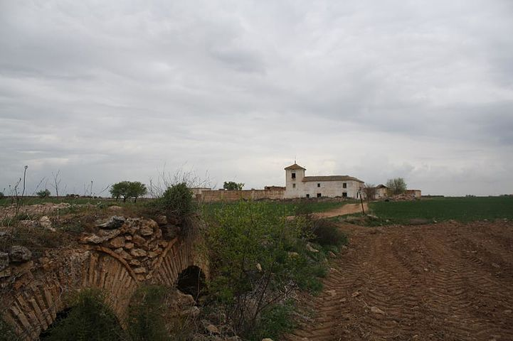 Vista de la Venta de Borondo desde el puente en el camino que proviene de Sierra Pelada.